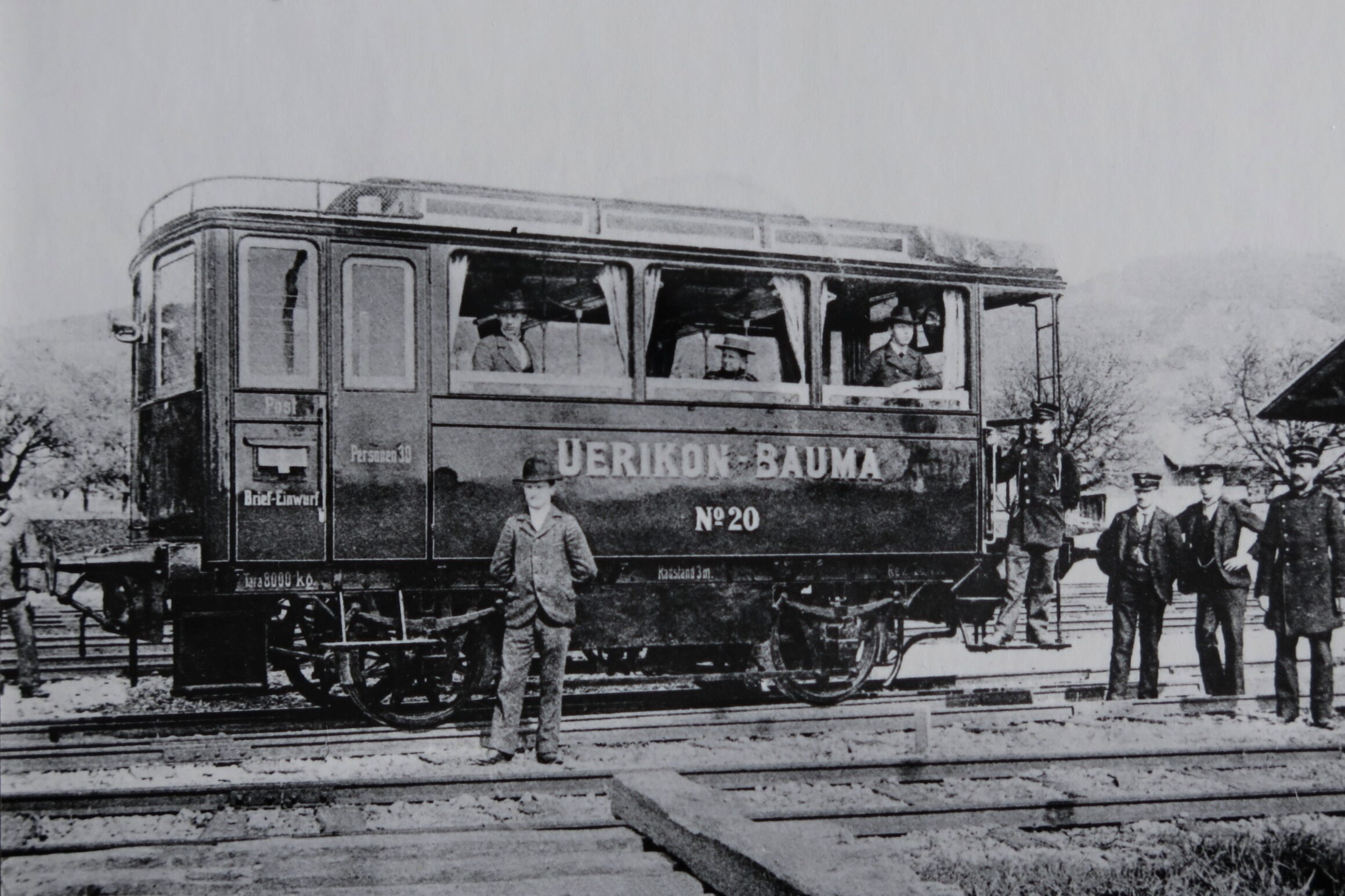 Motorwagen CZm 1/2 20 der Uerikon–Bauma-Bahn, abgekürzt UeBB, als Probewagen hergestellt durch die Automobilfarik Orion in Zürich.